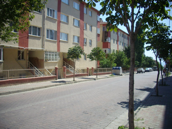 Улица в Джихангир махала - квартал "Авджълар"